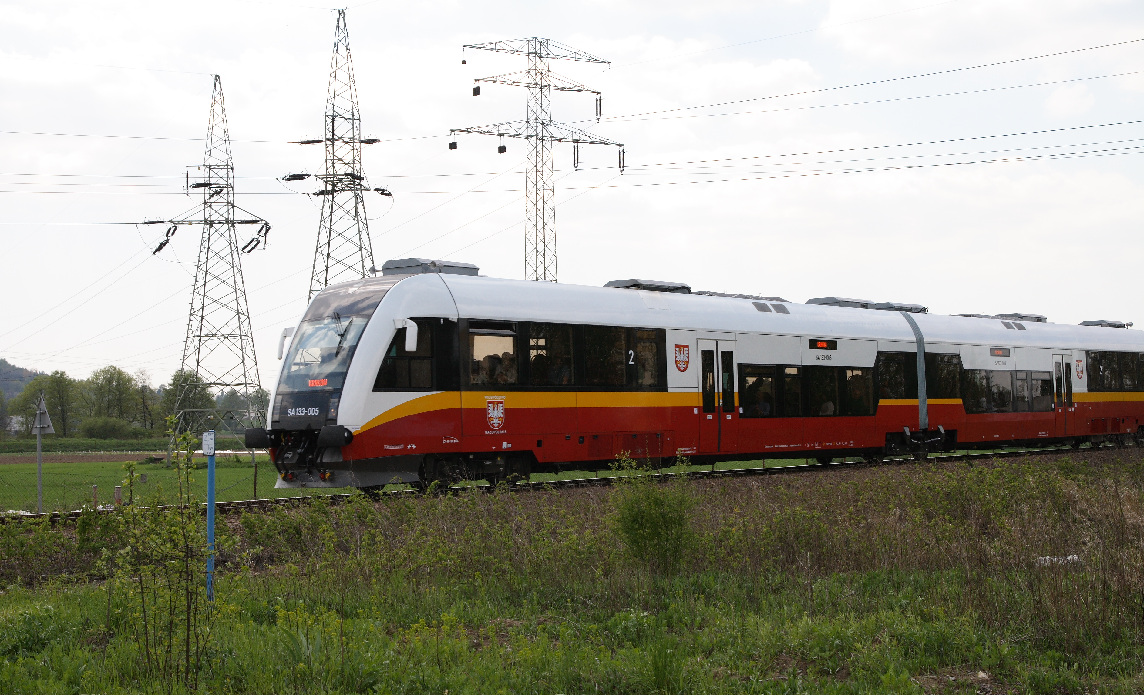 Szynobus SA133-005 na trasie z Balic do Krakowa w okolicach Mydlnik.